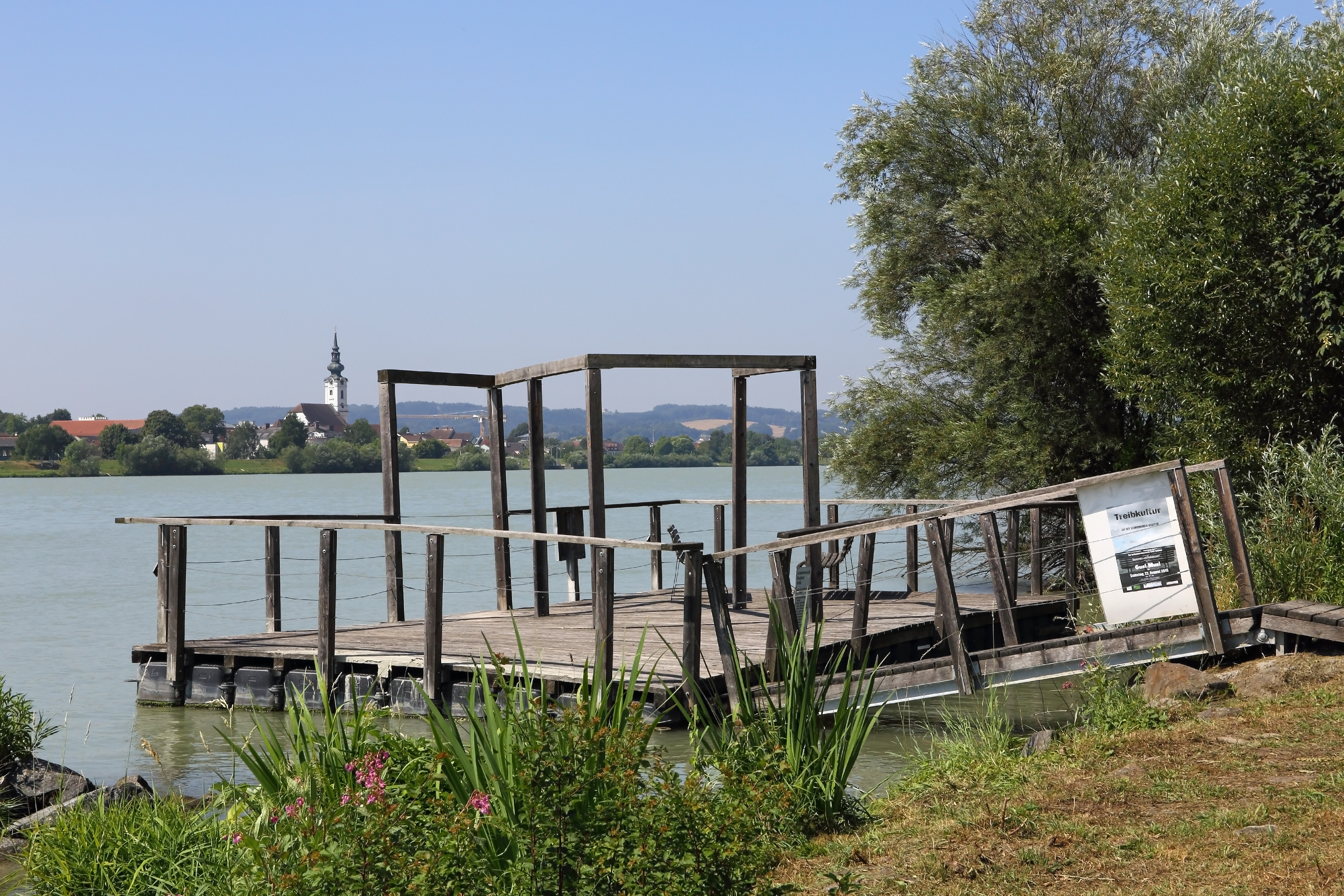 Die begehbare Skulptur "Erika" des Künstlers Max Bühlmann am Radweg der Donaulände in Klein-Pöchlarn.